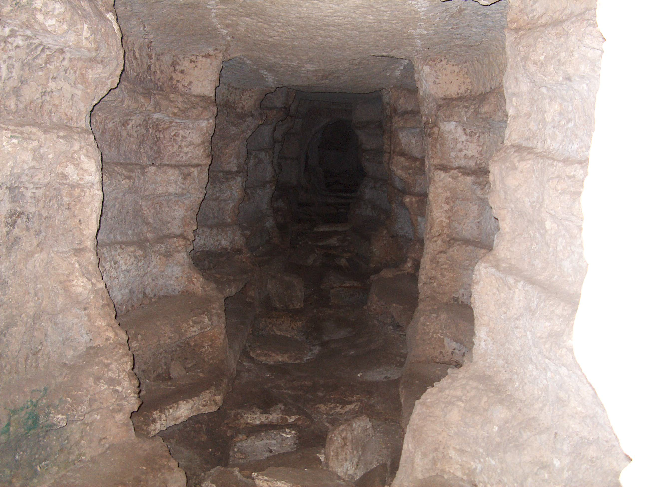 Corridoio laterale tomba Mulinello Augusta(SR)